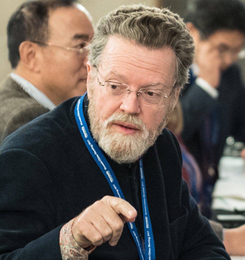 Keith Burnett, November 2017